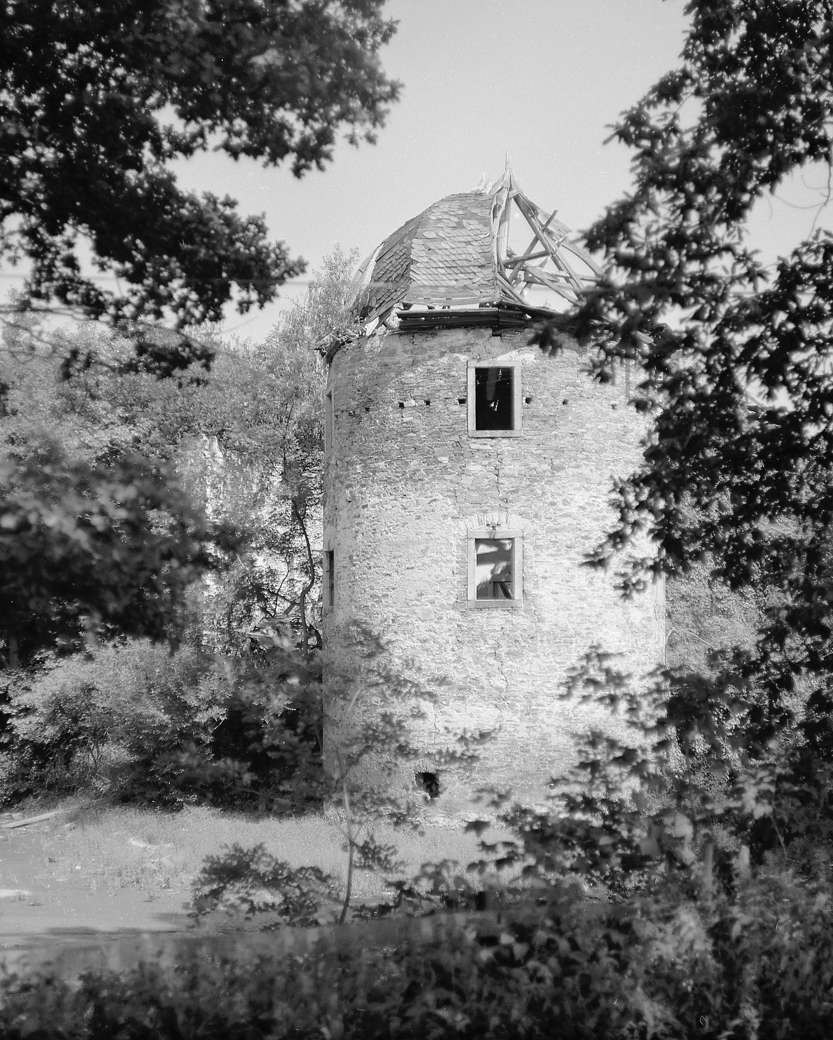 06.08.1986 9901 [08541] Mechelgrün (Neuensalz) Raumweg (GMP: 50.480594,12.237581): Schloßruine Mechelgrün, urspünglich mittelalterliche Wasserburg. 1974 stürzte der Dachstuhl ein. Die hier noch rudimentär vorhande Turmhaube bricht 1988 zusammen. [R19860806A09.TIF]19860806360NR.JPG(c)Blobelt